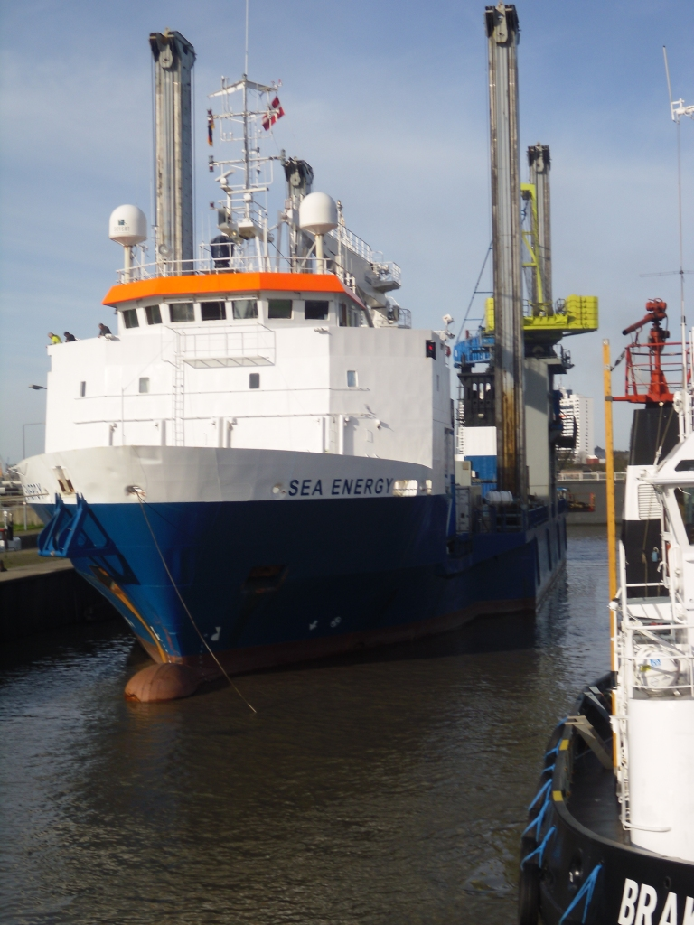 Die Sea Energy in der Fischereihafenschleuse von Bremerhaven